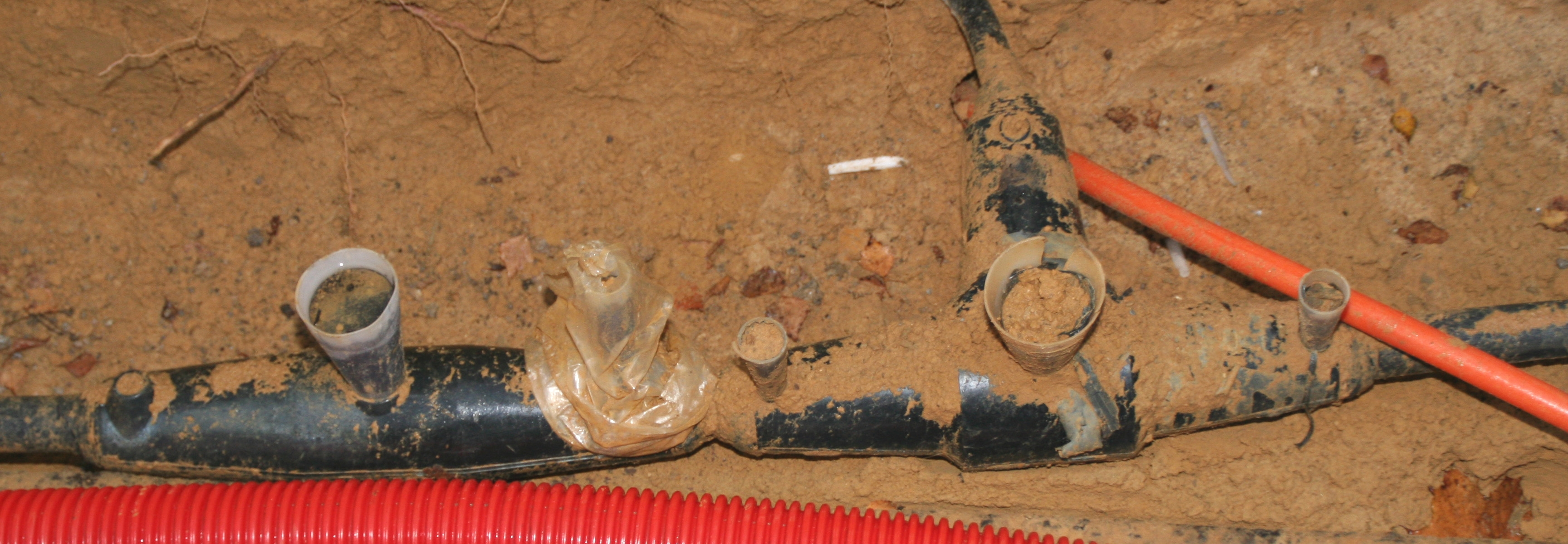 Muffe bei elektreschem niddervoltege Buedemkabel (lénks:Verbindungsmuff a riets:Parallelofzweigmuff)